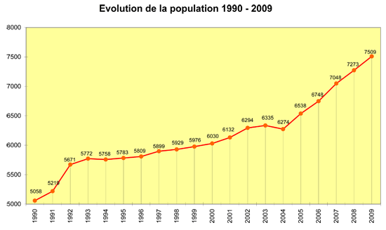 Evolution de la population de Fully